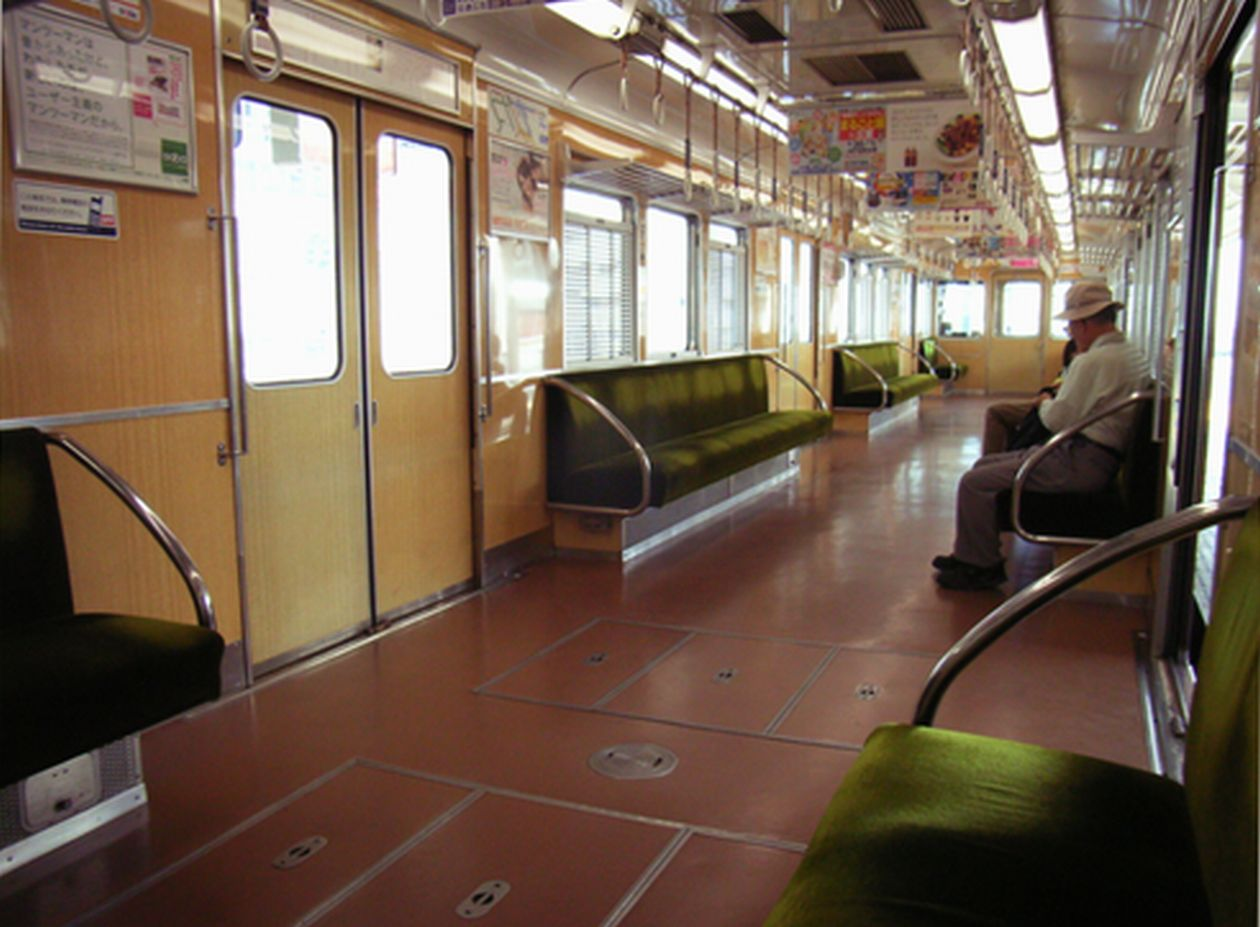 三宮駅停車中の3000系の車内。